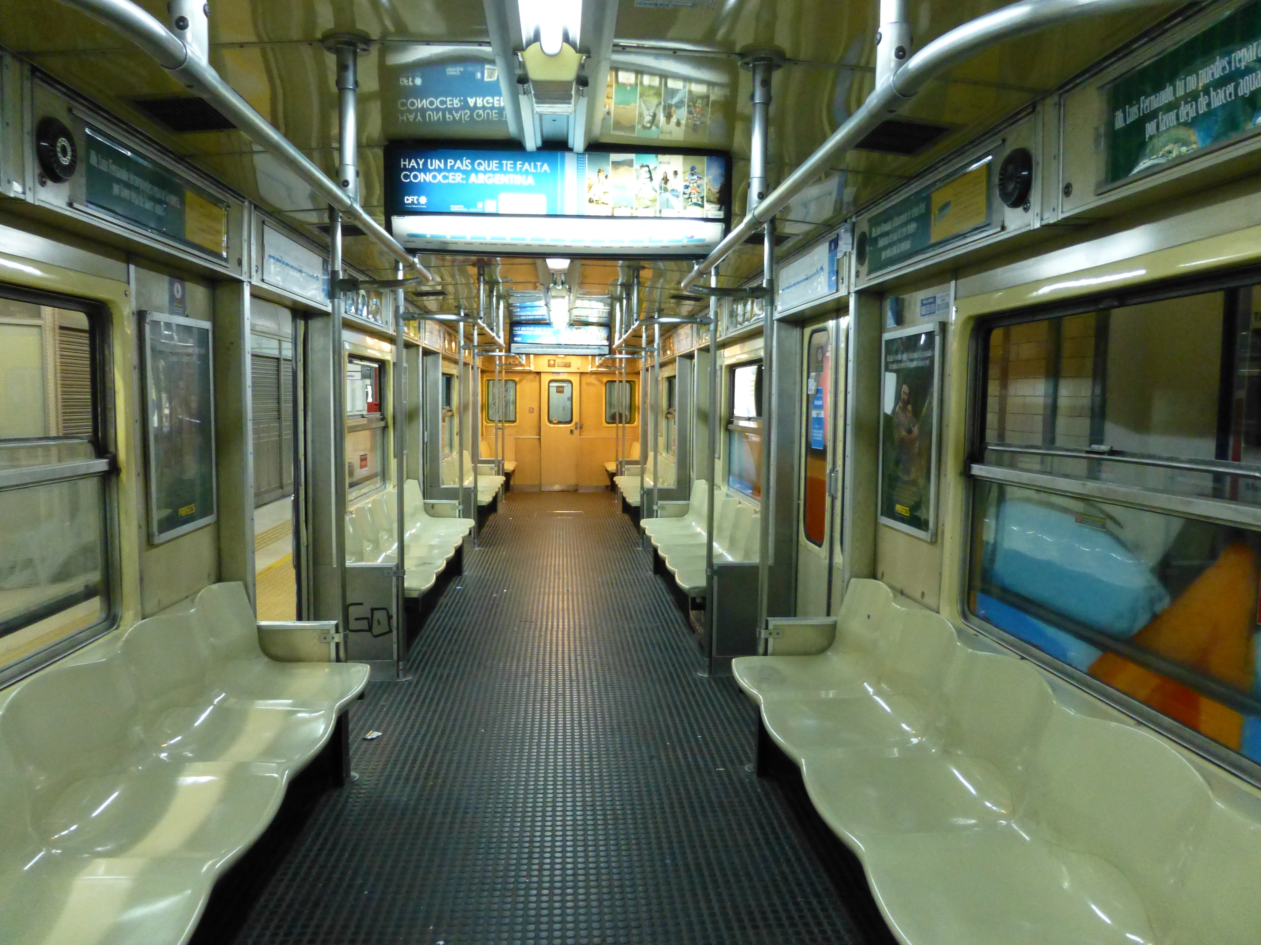 Interior de coche FIAT Materfer